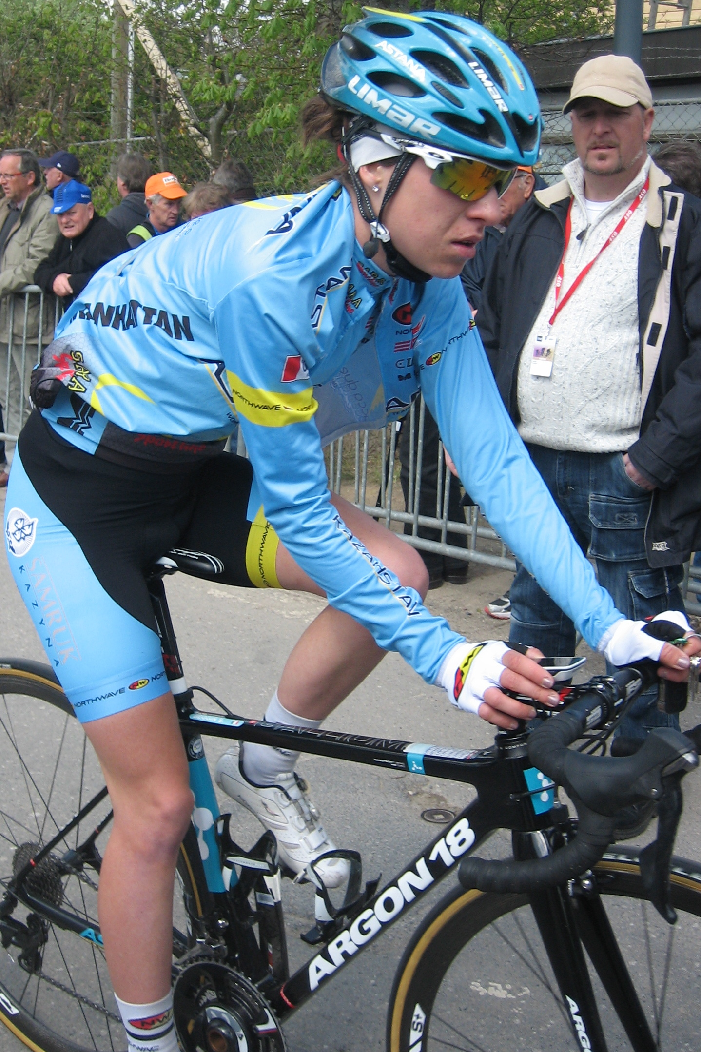 Finish van de Waalse Pijl 2017 in Huy.